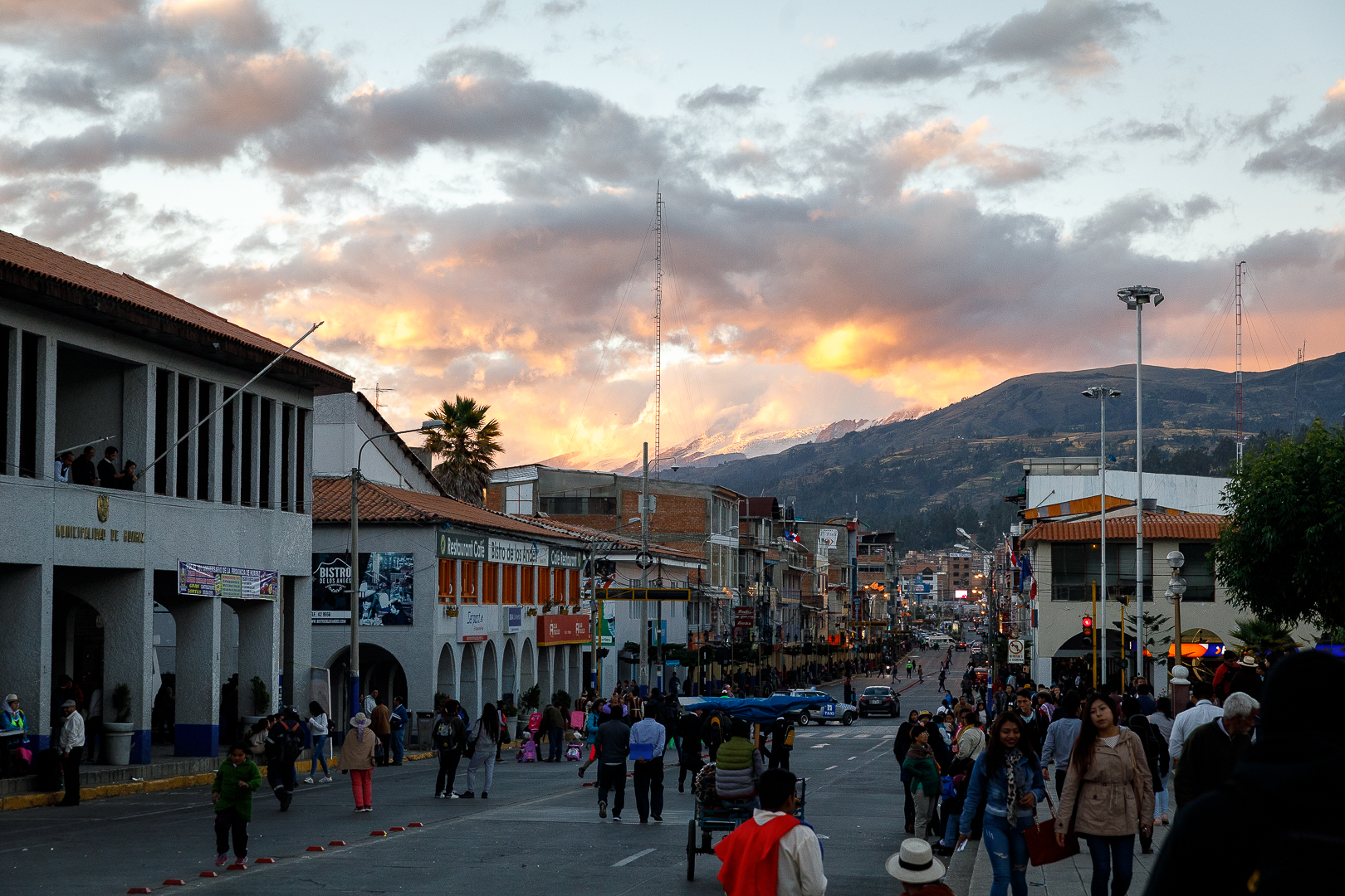 Fim de tarde na cidade de Huaraz, Ancas - Peru.